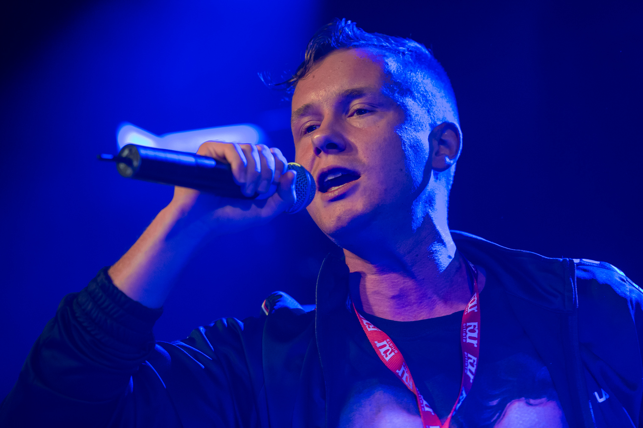 Concertbüro Franken,Der Hirsch,Fruchtmax,Konzert,Livekonzert,Livemusik,Musik